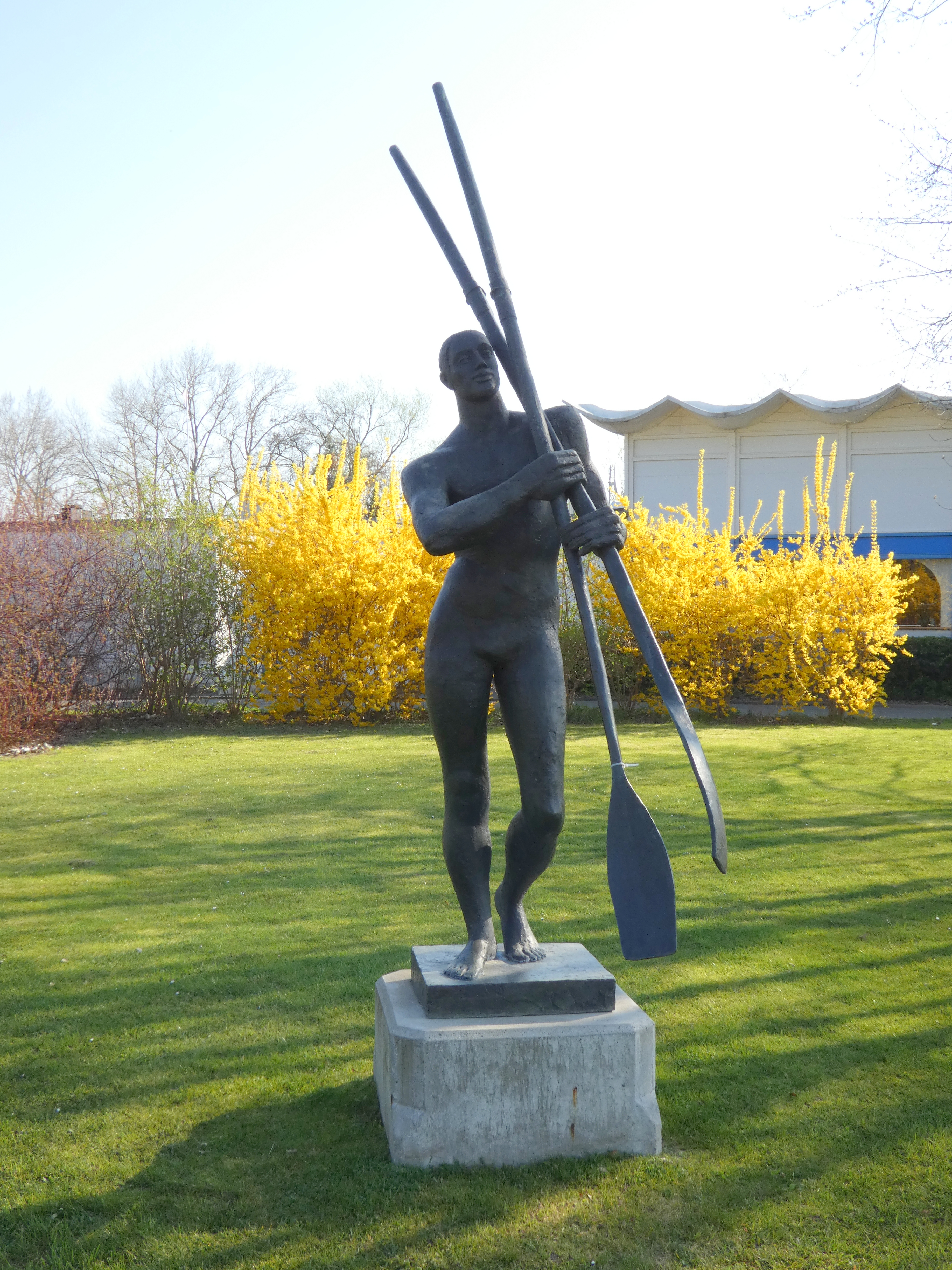 Skulptur Ruderer, Monika Spiess, Regattastrecke Beetzsee, Brandenburg an der Havel